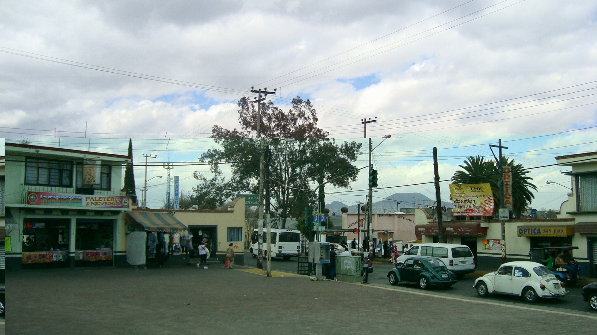 Vista de la plaza Abelardo L. Rodríguez en San Juan Ixtayopan (México).